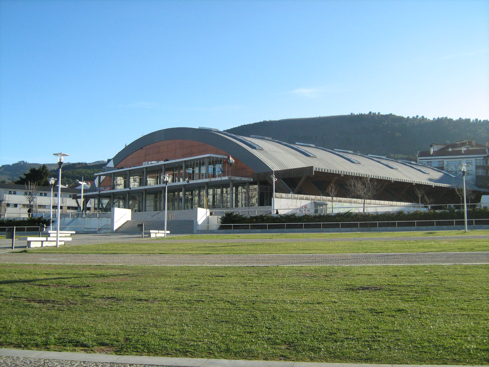 Pavilhão Multiusos, Fundão